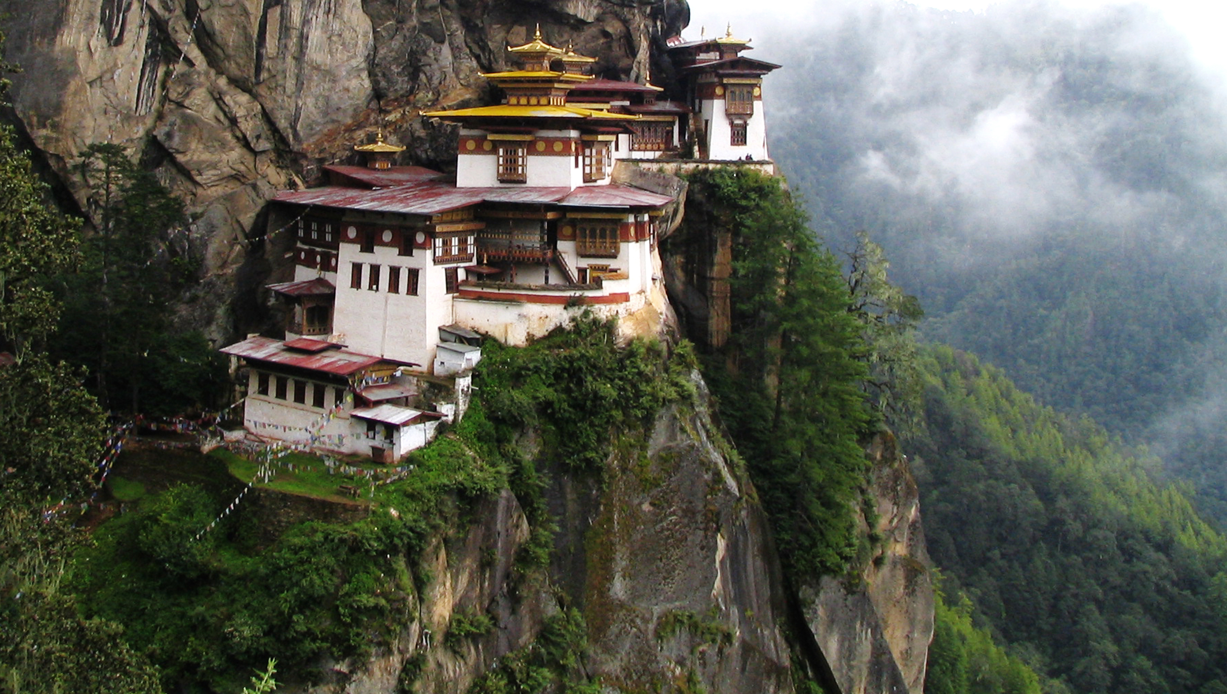 Taktshang Monastery, Bhutan